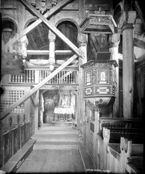 Urnes stavkyrkje interiør